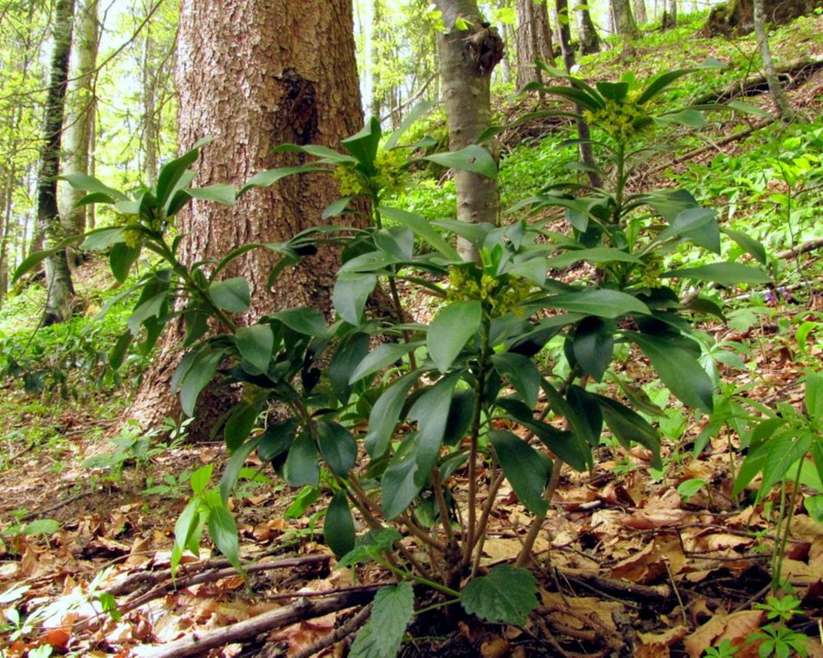 Lovorolistni volčin na južnem pobočju Kompotele (Grintovci).